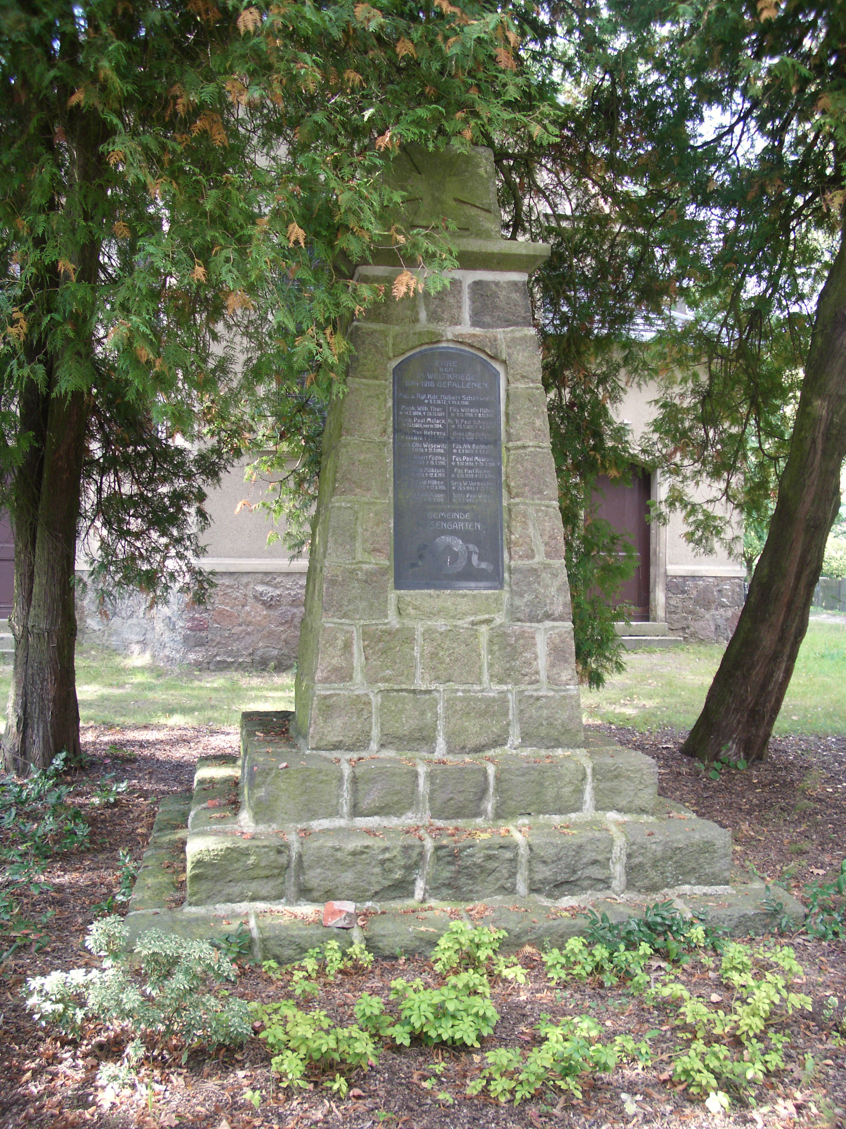 Gefallenendenkmal Frankfurt-Rosengarten